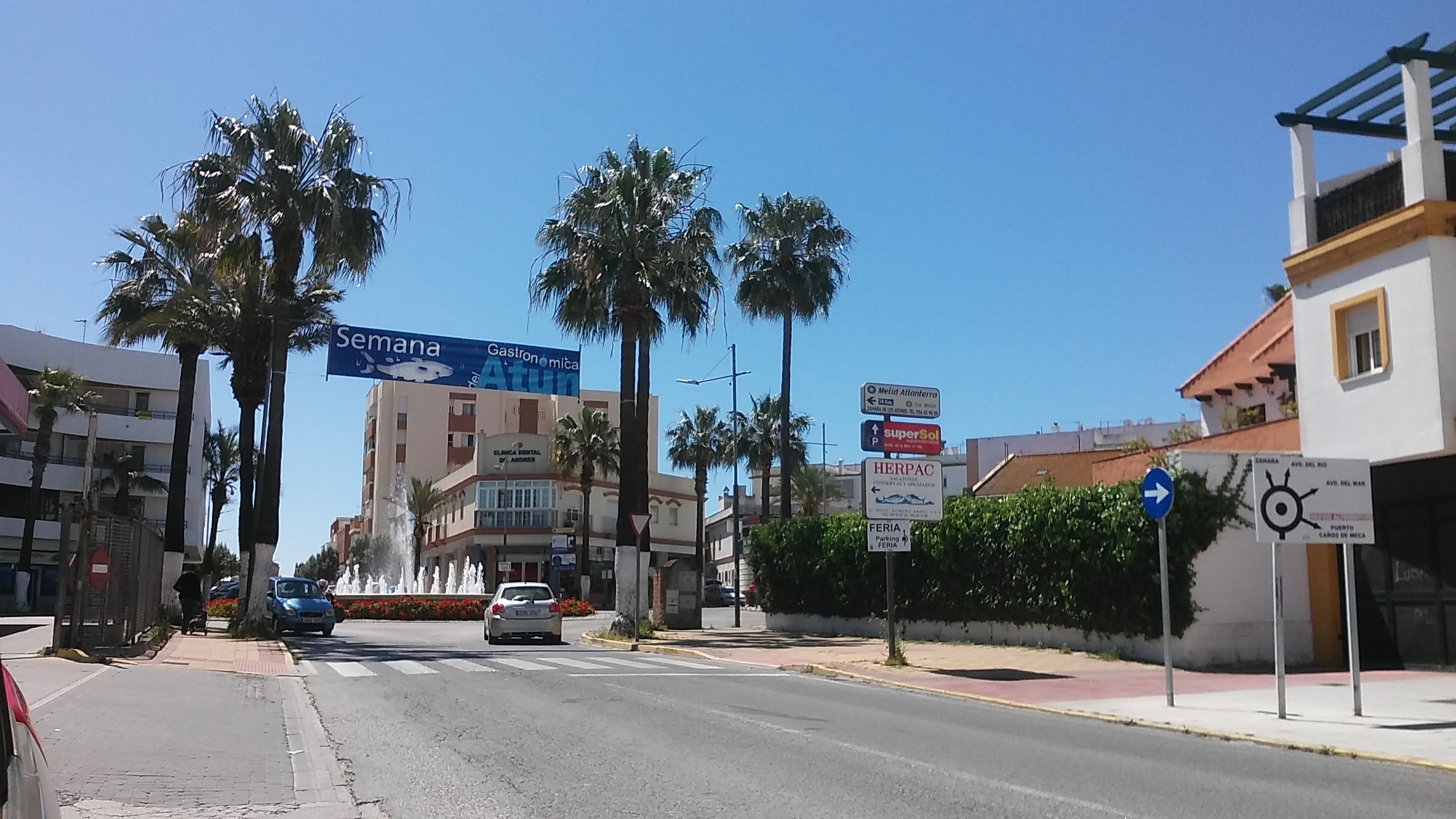 Cartel de la Feria del Atún en Barbate, Andalucía (España)